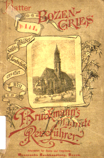 cover of: J.C. Platter (= 1897) Bozen-Gries (Bruckmann's illustrierte Reisefuhrer)[1] (in German), Munich: A. Bruckmann